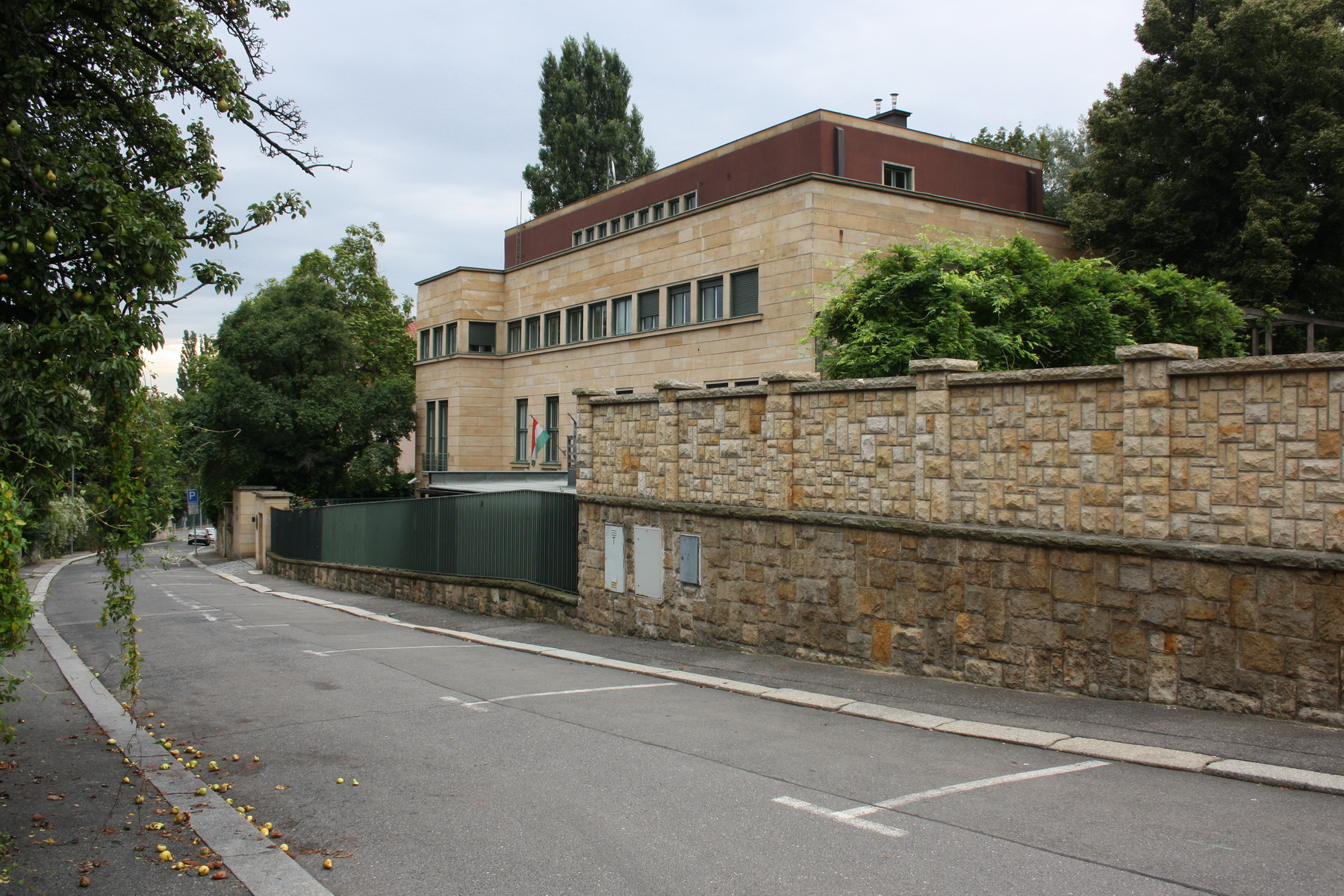 Bruno Paul: Vila Traub (v současnosti Velvyslanectví Maďarska v České republice), Praha 6 - Střešovice, č.p. 658, Pod hradbami 17